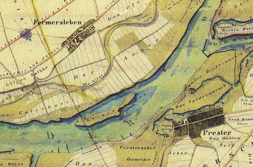 Karte der Elbe zwischen Fermersleben und Prester um 1838, mit Elbinsel Katzenwerder